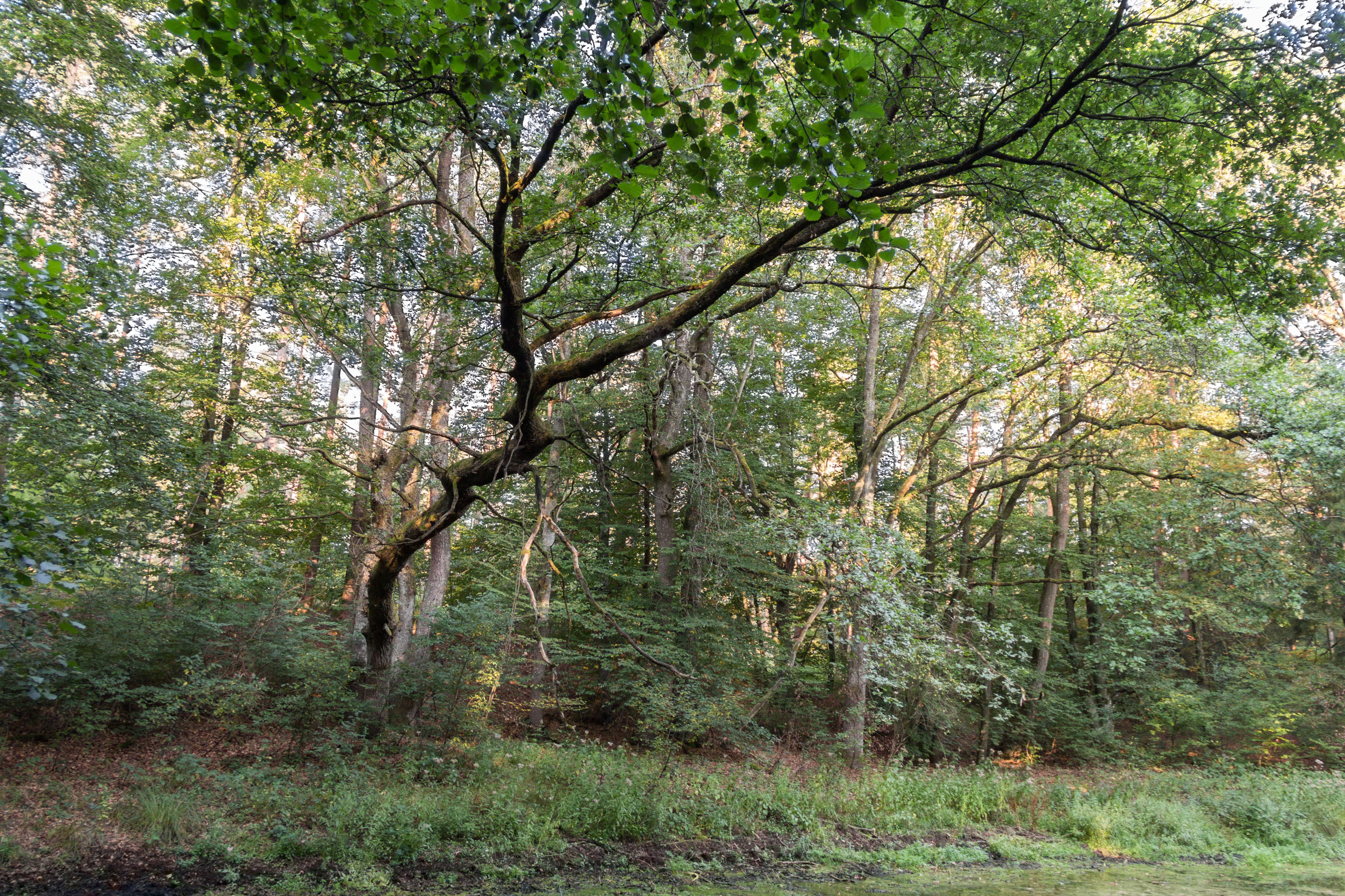 Eichengruppe, Unterer Egelsee, Naturdenkmal, Winkelhaid (gemeindefreies Gebiet)